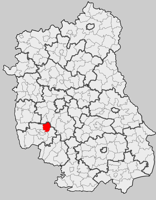 Map of gmina Wilkołaz, Kraśnik county, Lublin voivodship Mapa gminy Wilkołaz, powiat kraśnicki, województwo lubelskie